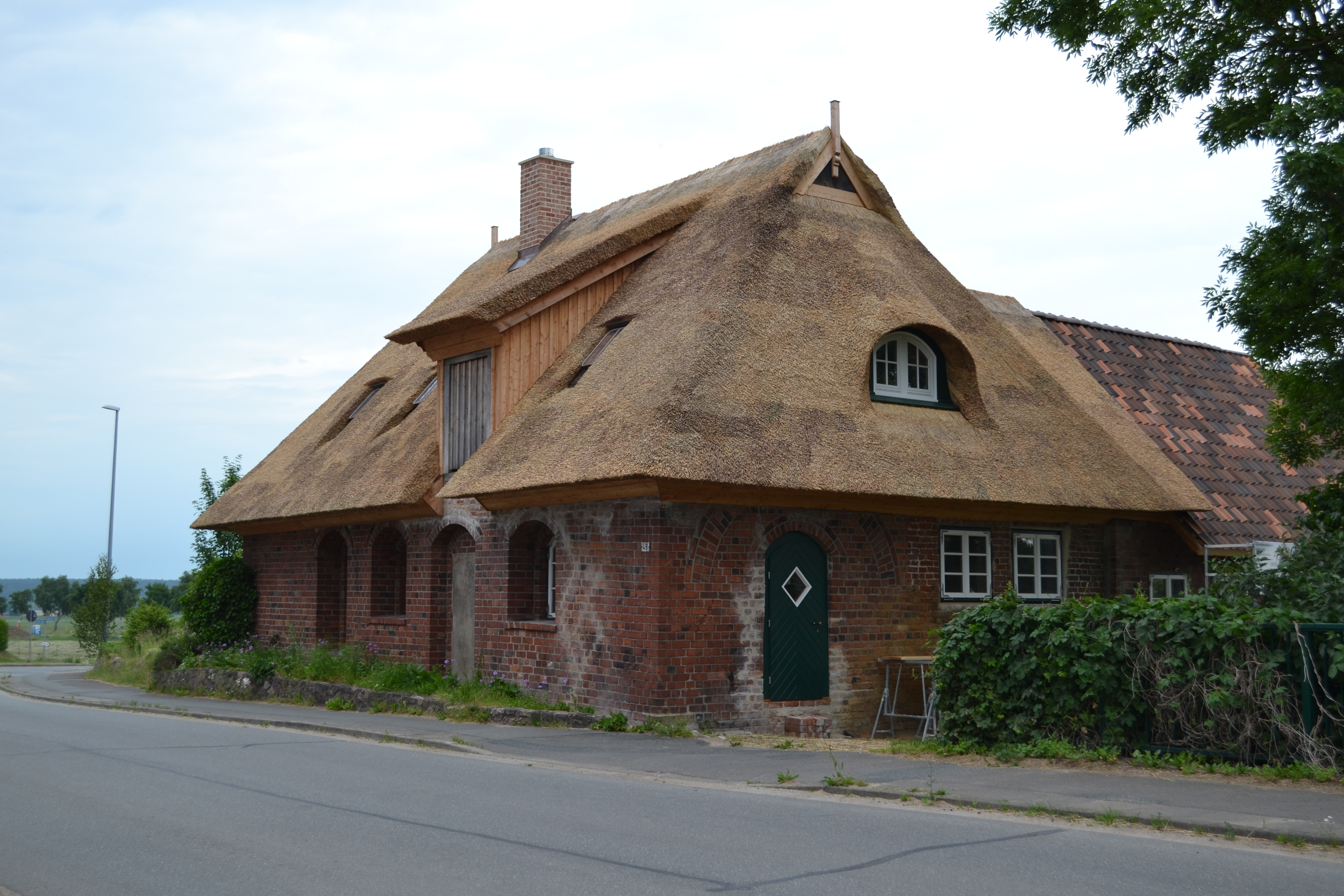 Ehemaliges Amtshaus Bütlinger Straße 48